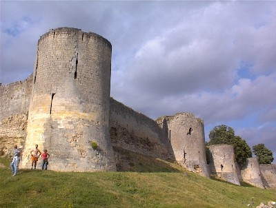 Photo du rempart de coucy